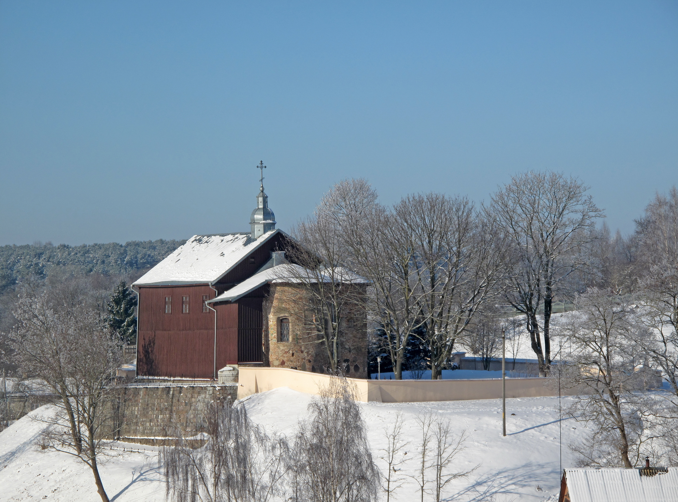 Беларуская (тарашкевіца): Зимний день